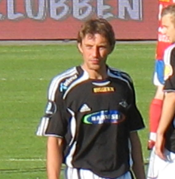 Fotballspilleren Vidar Riseth